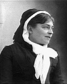 Blanche Pierson dans François le Champi à la Comédie-Française (cliché Nadar)